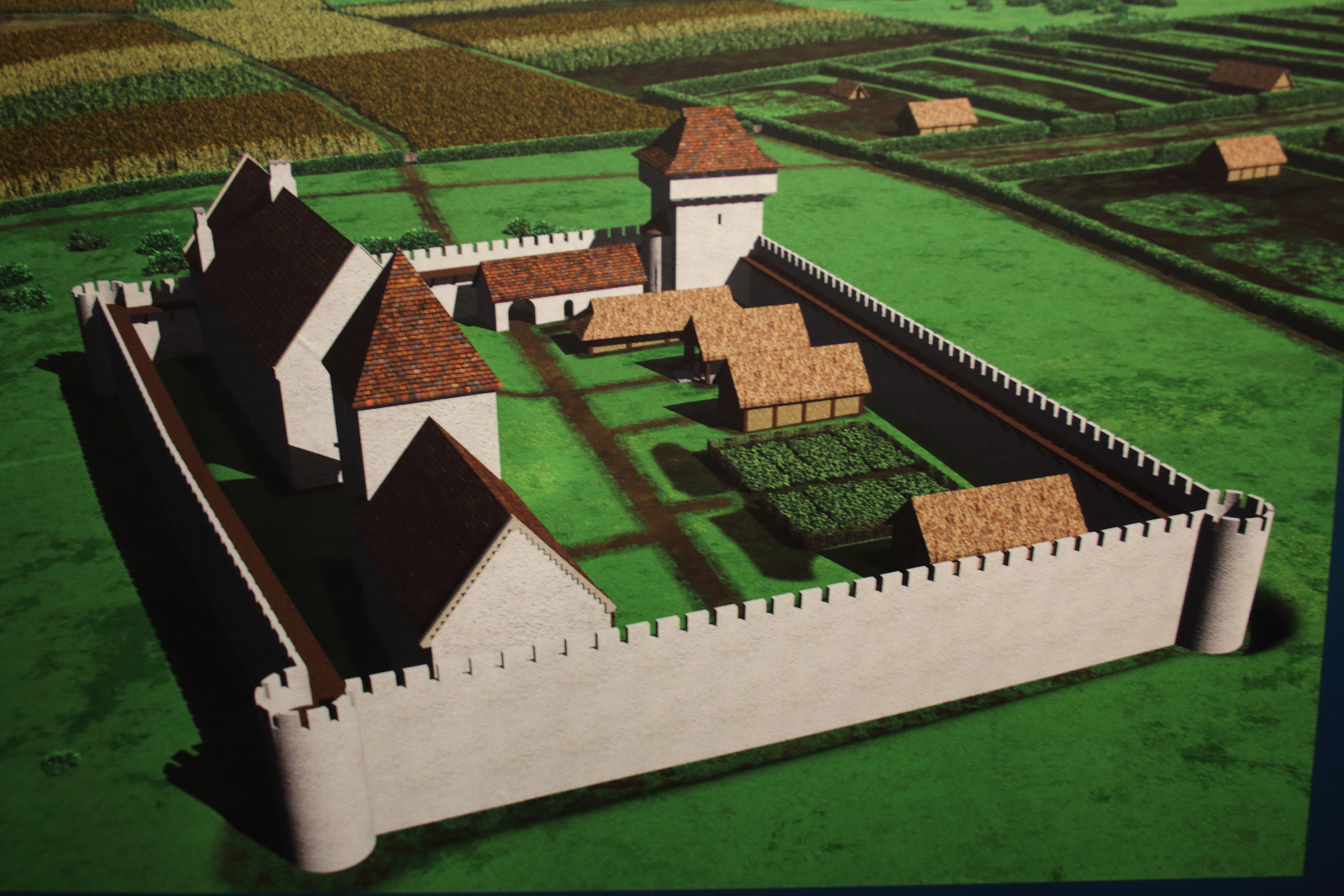 reconstructie Egmontkasteel Zottegem 1300-1400, tentoonstelling 'Graven in Vryheydt' Provinciaal Archeocentrum AVE Velzeke